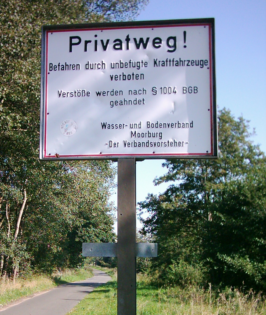 Kennzeichnung eines Privatwegs des Wasser- und Bodenverbandes Moorburg, Hamburg-Moorburg.